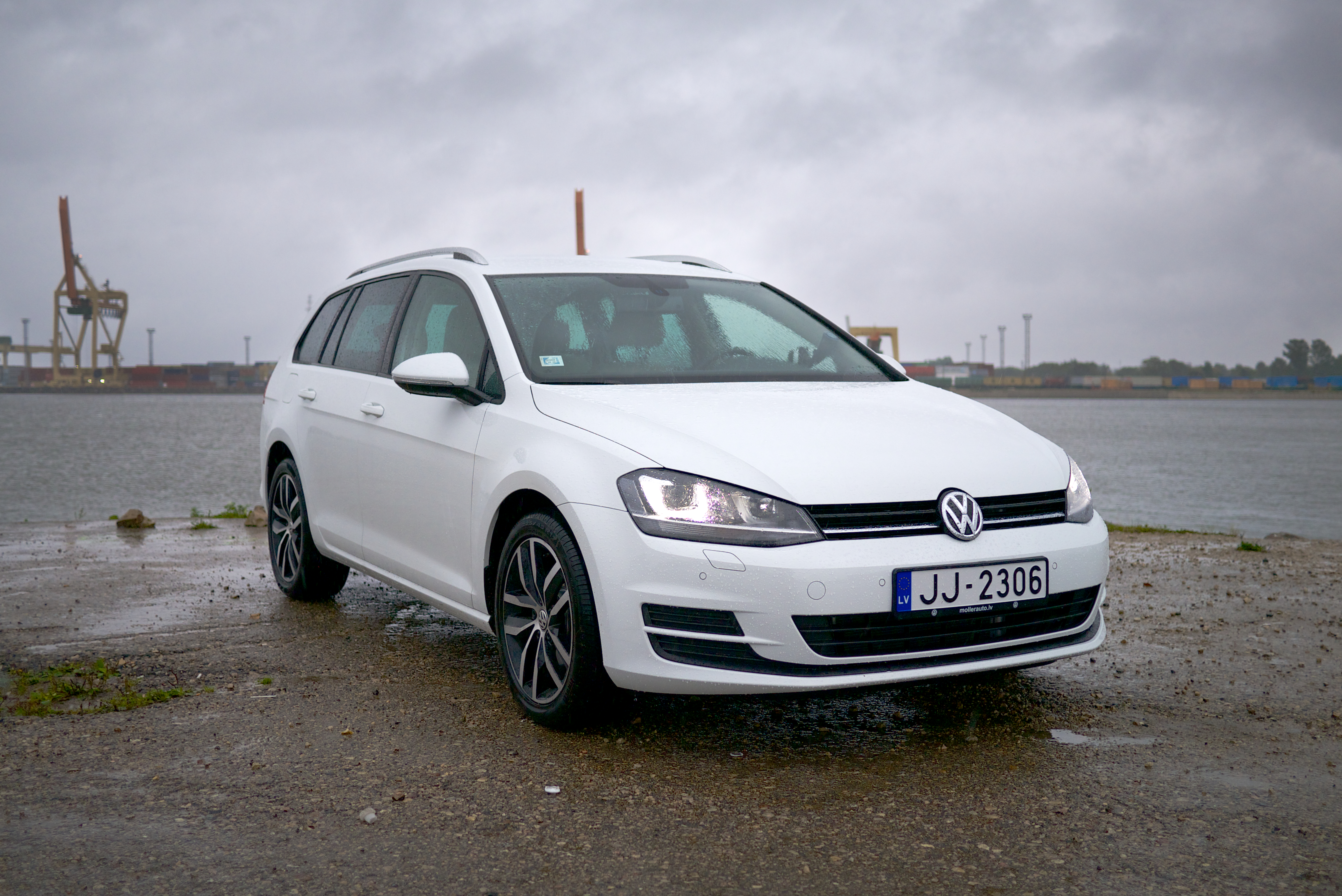 Volkswagen Golf Variant 2013